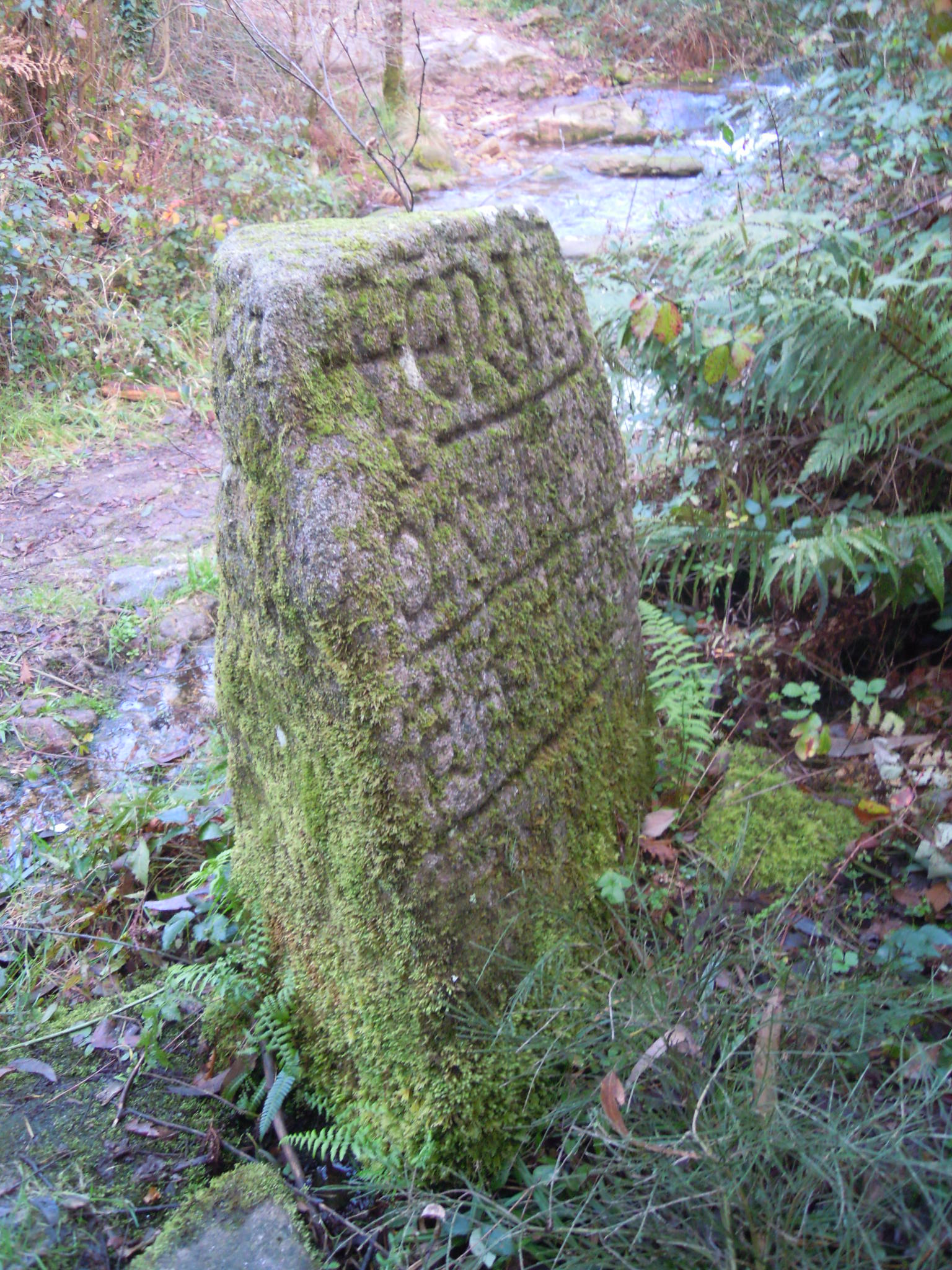 Marco II do Couto de Lampai, na parroquia de Cruces (Padrón). Vista de dúas caras desde o suroeste: Era MCXCIV et quotum I kalendas septemberis cum auctoritatem imperatoris et omnibus intervinientibus patronim statuit (Ano 1156 no primeiro día das calendas de setembro coa autoridade do Emperador e de tódolos asistentes poño este pedrón).